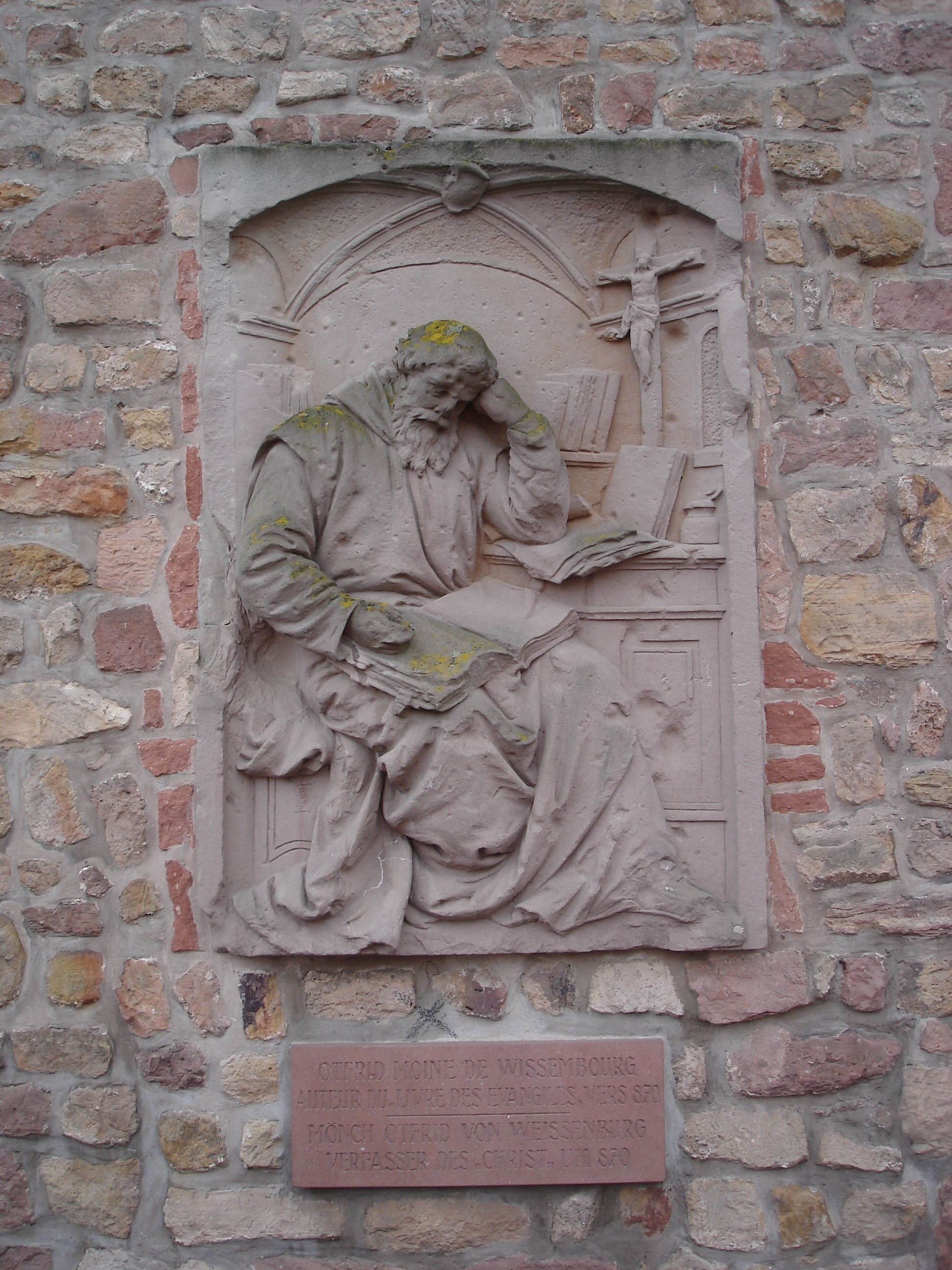 Reliefbild von Otfrid von Weißenburg in Wissembourg